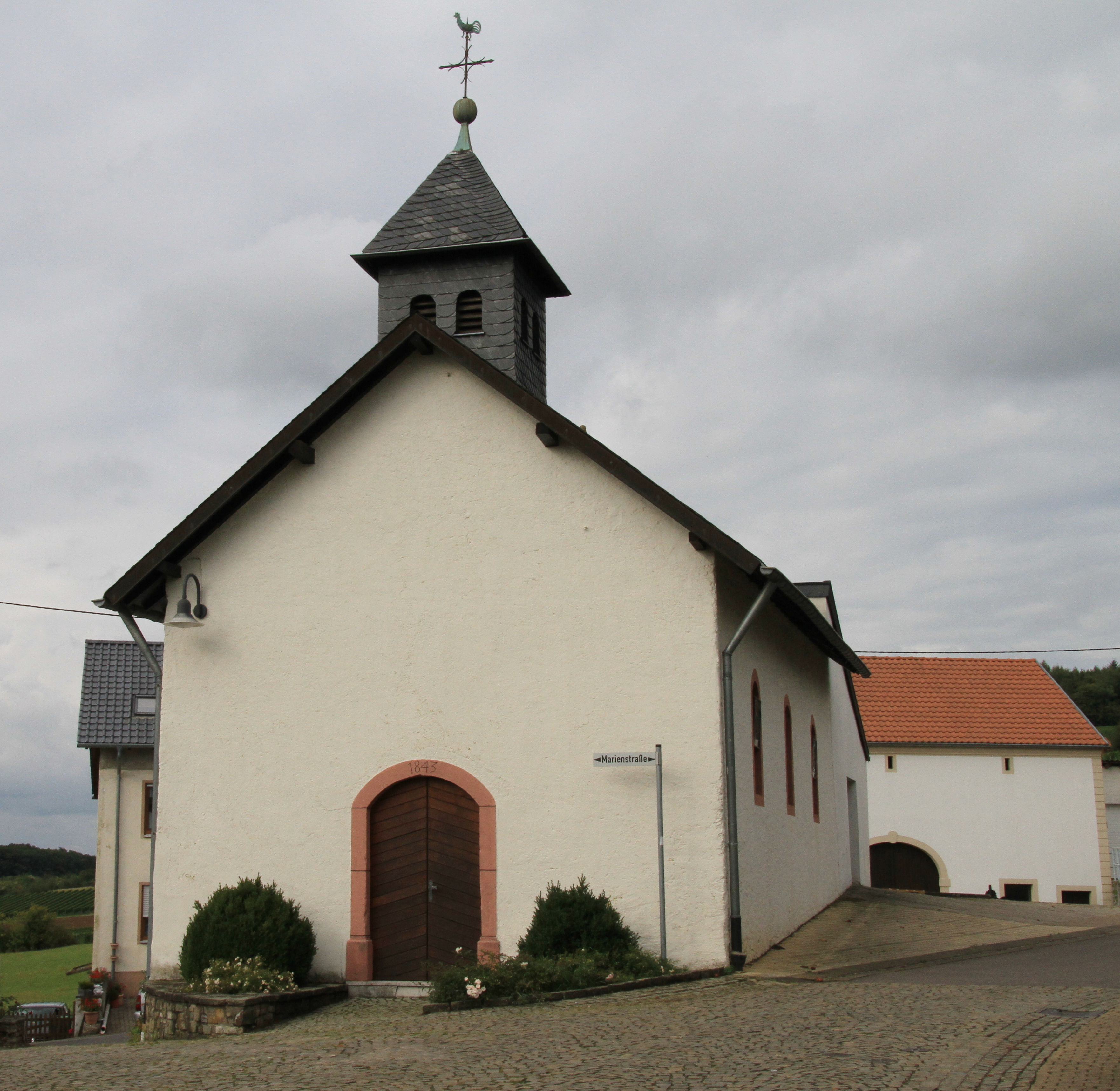 Kapelle St. Marien in Sehndorf